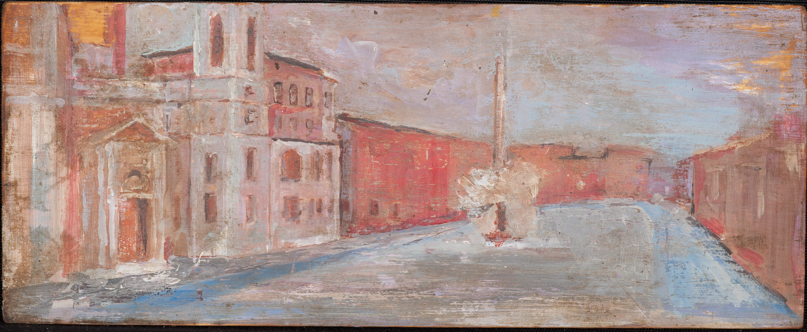 Piazza Navona - olio su tavola - anno 1962 - di Paolo Salvati, artista e pittore italiano che ha frequentato la storica piazza dagli anni settanta agli anni novanta come pittore e ritrattista